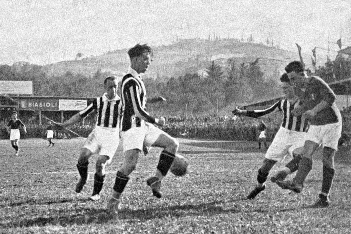 Bologna (Italia), stadio Sterlino, 11 luglio 1926. Un frangente della sfida tra Bologna e Juventus (2-2) valevole per l'andata della finale di Lega Nord del campionato italiano di Prima Divisione 1925-26; da sinistra: gli juventini József Viola, Virginio Rosetta e Luigi Allemandi, e il bolognese Giuseppe Della Valle.